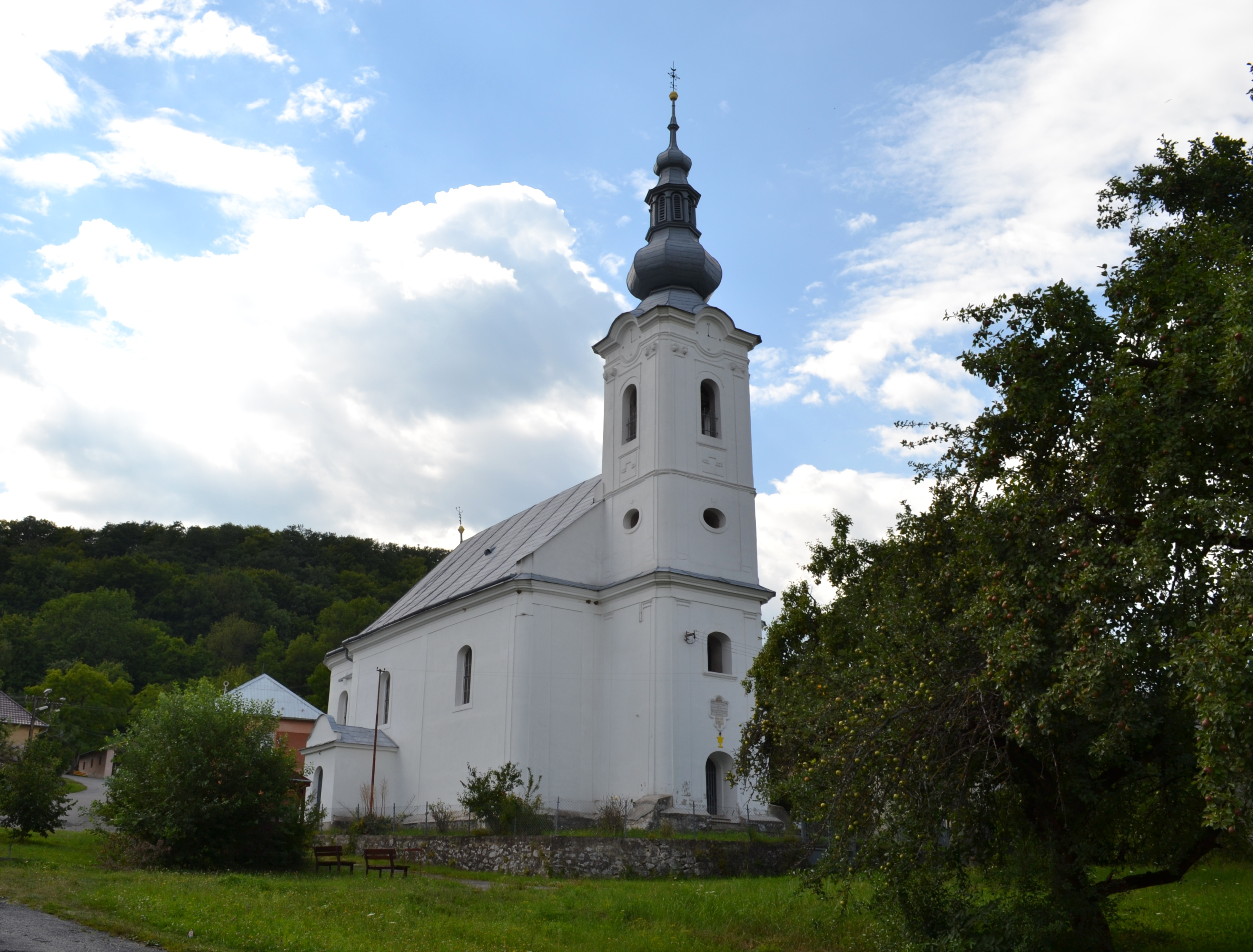 Evanjelický kostol z roku 1810